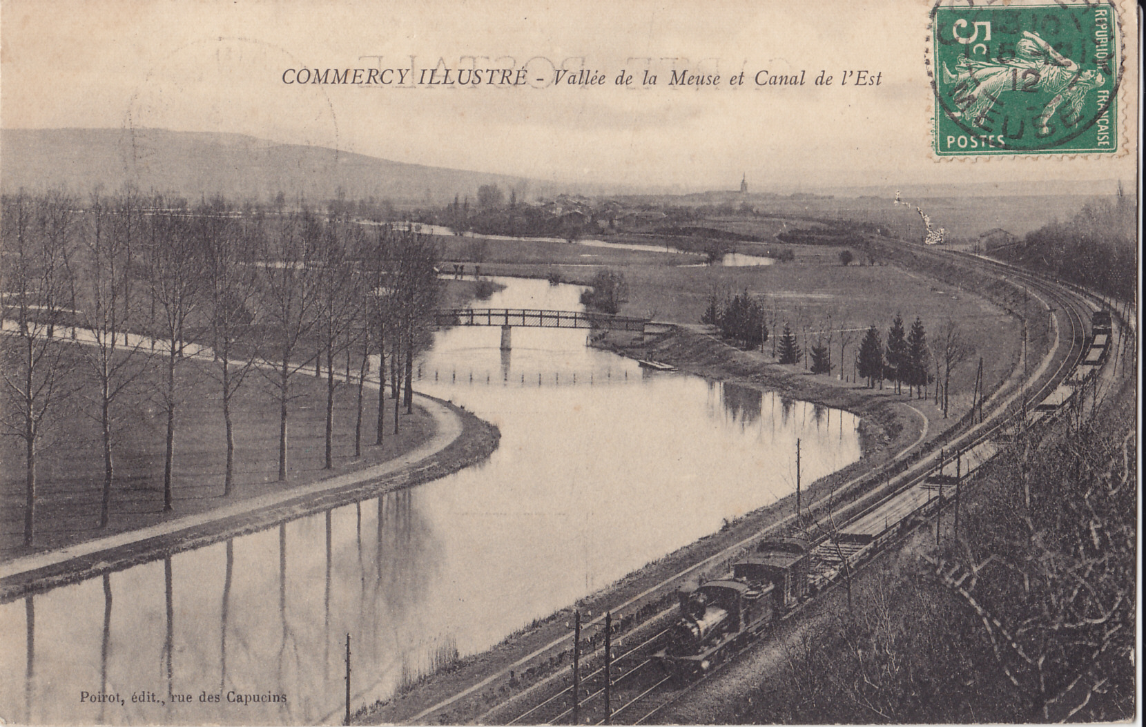 Carte postale ancienne éditée par Poirot, rue des Capuçins, collection Commercy illustré : Vallée de la Meuse et Canal de l'Est